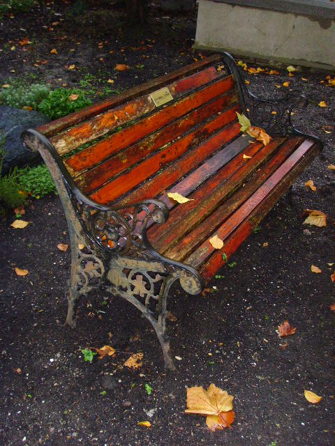 Het "Biegel Bankje" naast het graf van kinderboekenschrijver Paul Biegel op begraafplaats Zorgvlied